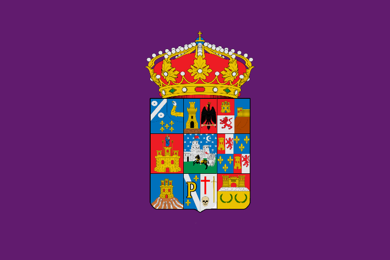 Bandera de la provincia de Guadalajara con sus antiguos nueve partidos judiciales originales: Molina, Sigüenza, Atienza, Brihuega, Guadalajara, Cogolludo, Cifuentes, Pastrana y Sacedón.